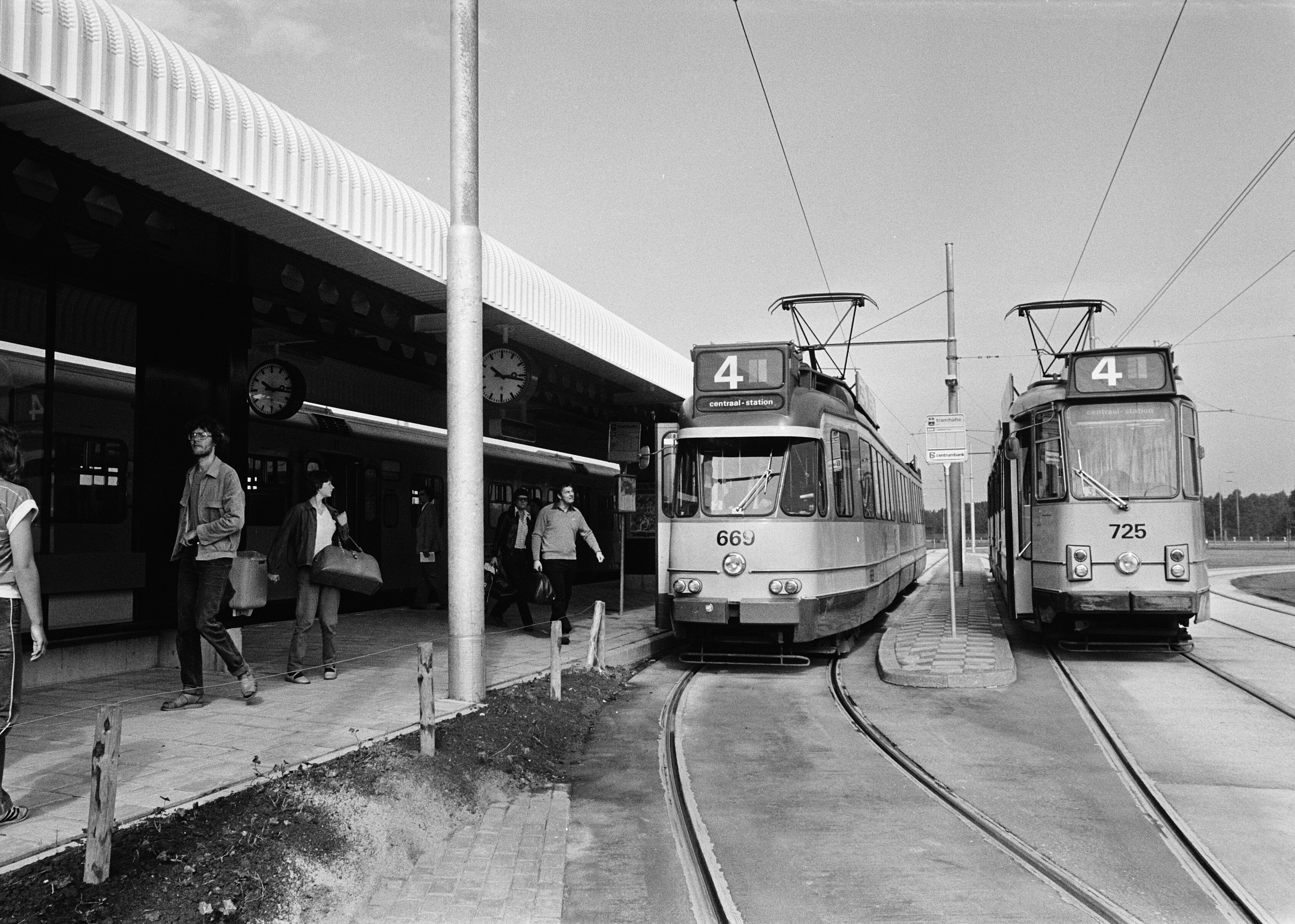 Collectie / Archief : Fotocollectie Anefo Reportage / Serie : [ onbekend ] Beschrijving : Schiphollijn in gebruik genomen; links de trein en rechts tram bij station RAI Datum : 1 juni 1981 Trefwoorden : stations, trams, treinen Instellingsnaam : RAI Fotograaf : Smirren, […] van / Anefo Auteursrechthebbende : Nationaal Archief Materiaalsoort : Negatief (zwart/wit) Nummer archiefinventaris : bekijk toegang 2.24.01.05 Bestanddeelnummer : 931-5203